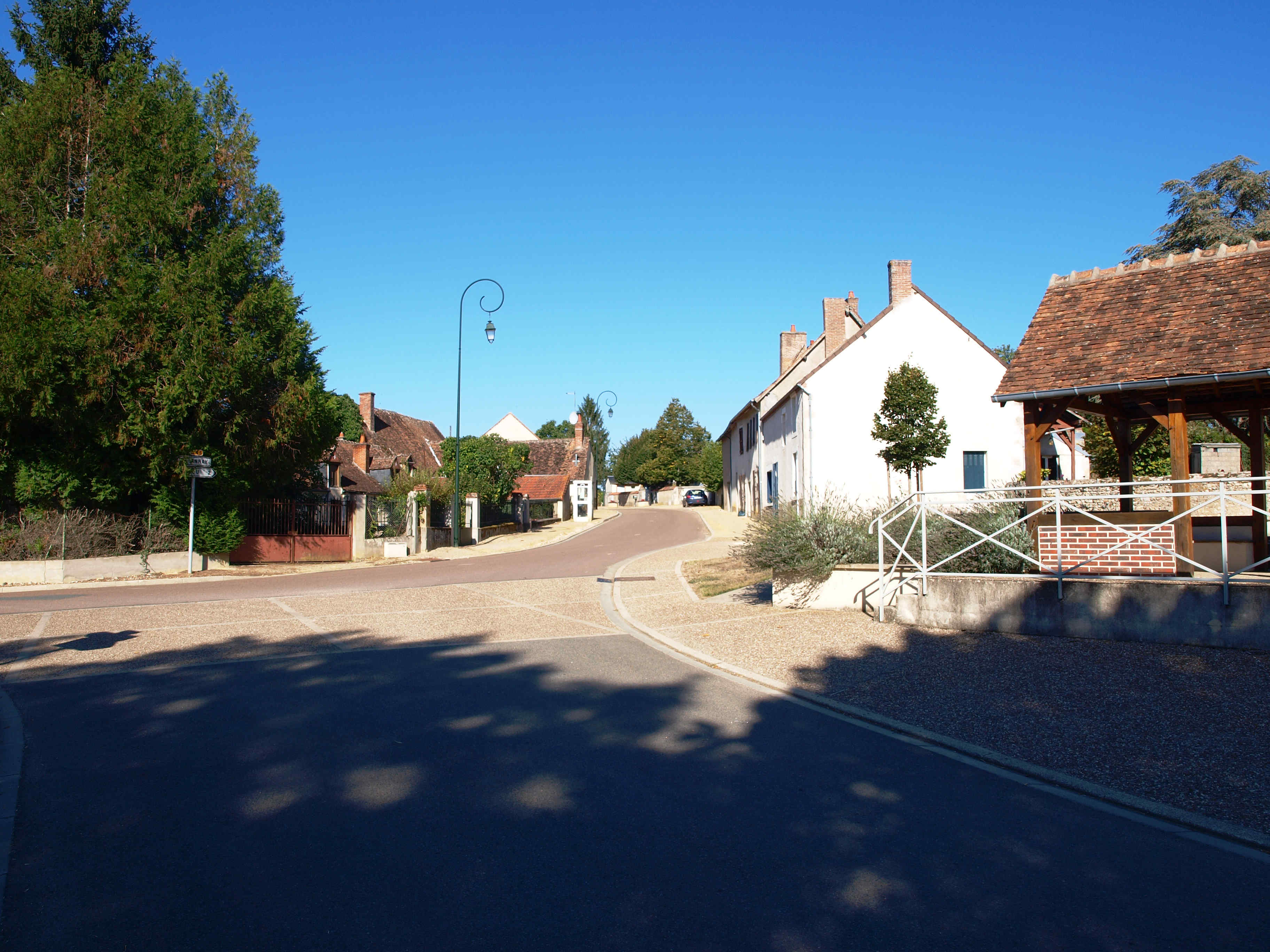 Faverelles (Loiret, France) ; route de Thou.